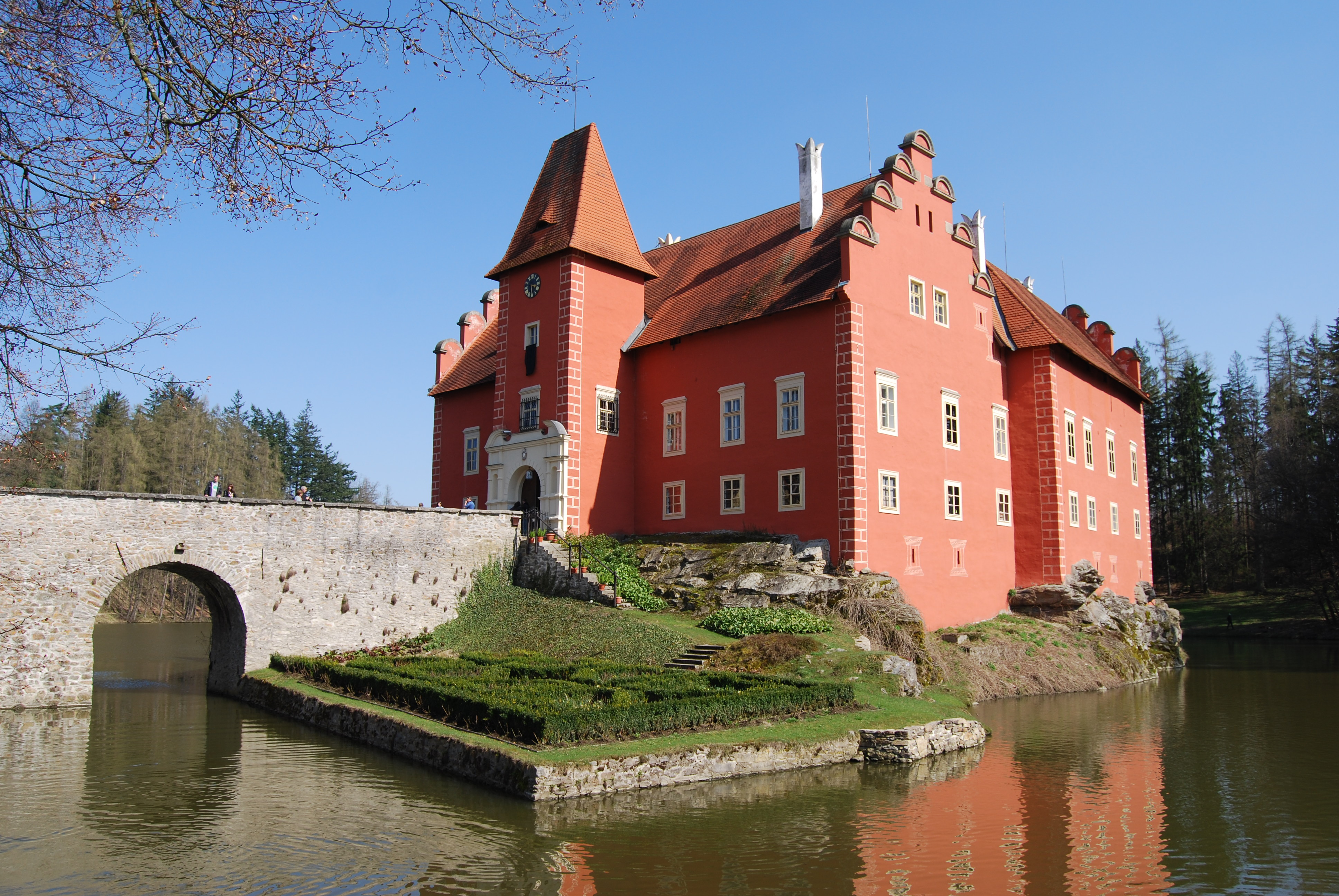 Zámek Červená Lhota. Okres Jindřichův Hradec. Česko.